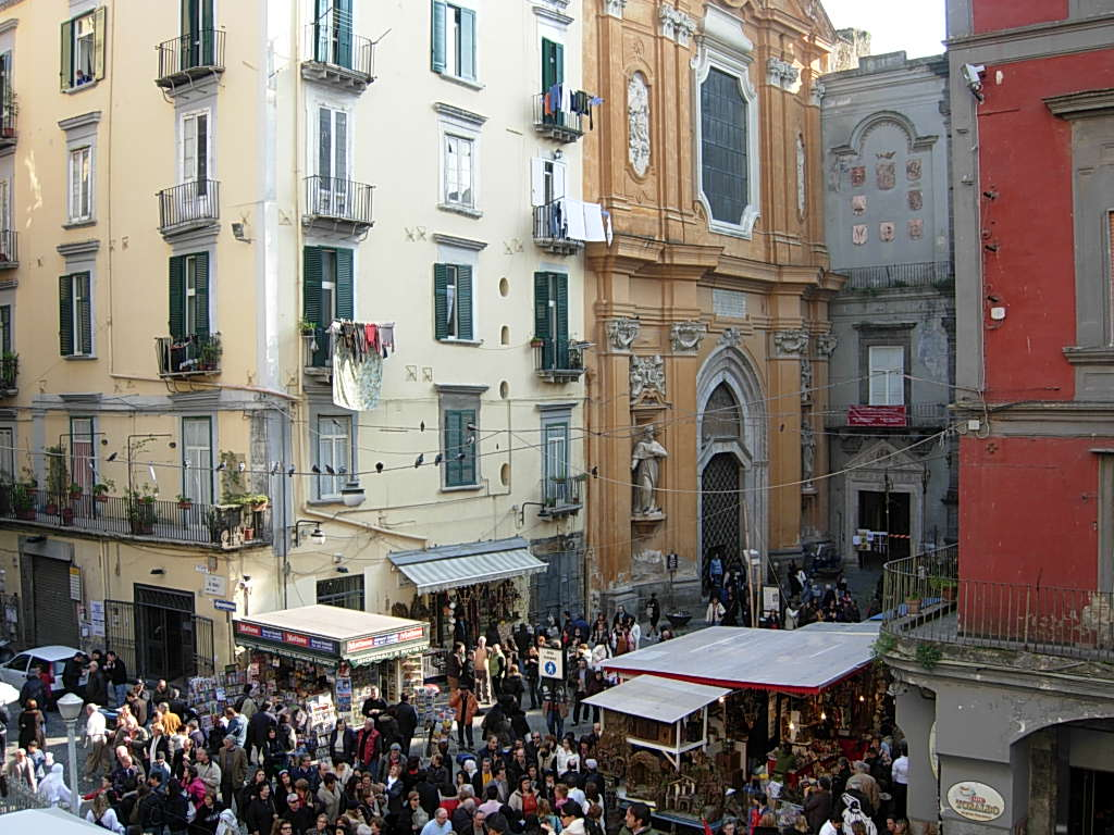 Facciata della Chiesa di San Lorenzo Maggiore e Piazza San Gaetano in Napoli Foto personale